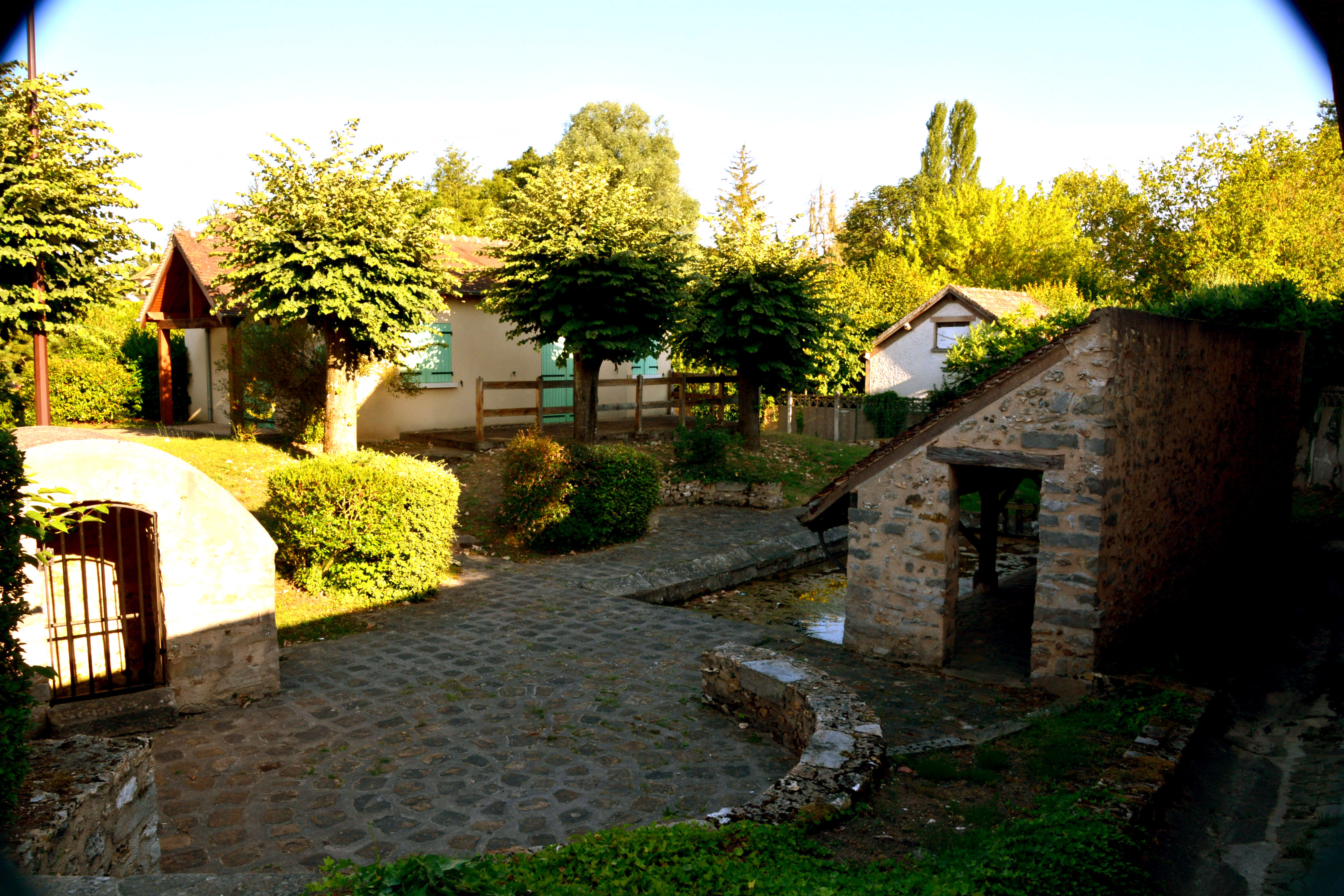 Lavoir du centre bourg